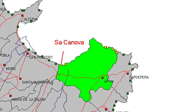 Skizze Sa Canova